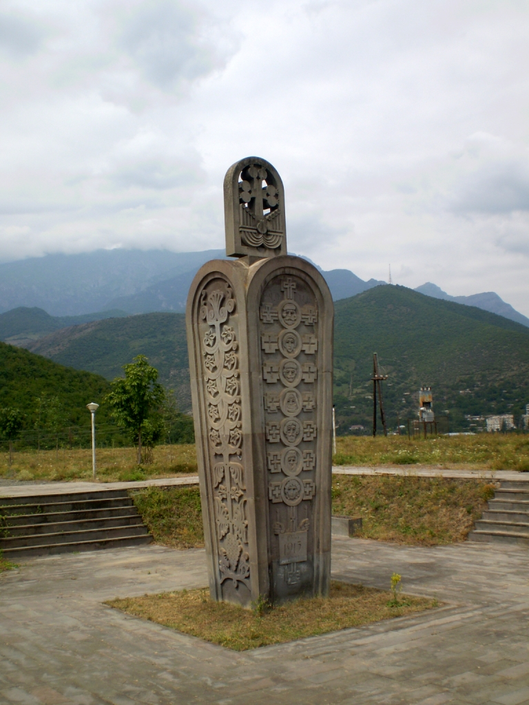 Մեծ Եղեռնի զոհերի հիշատակի հուշակոթող Կապանի Բաղաբուրջի հուշահամալիրում 1/16.3